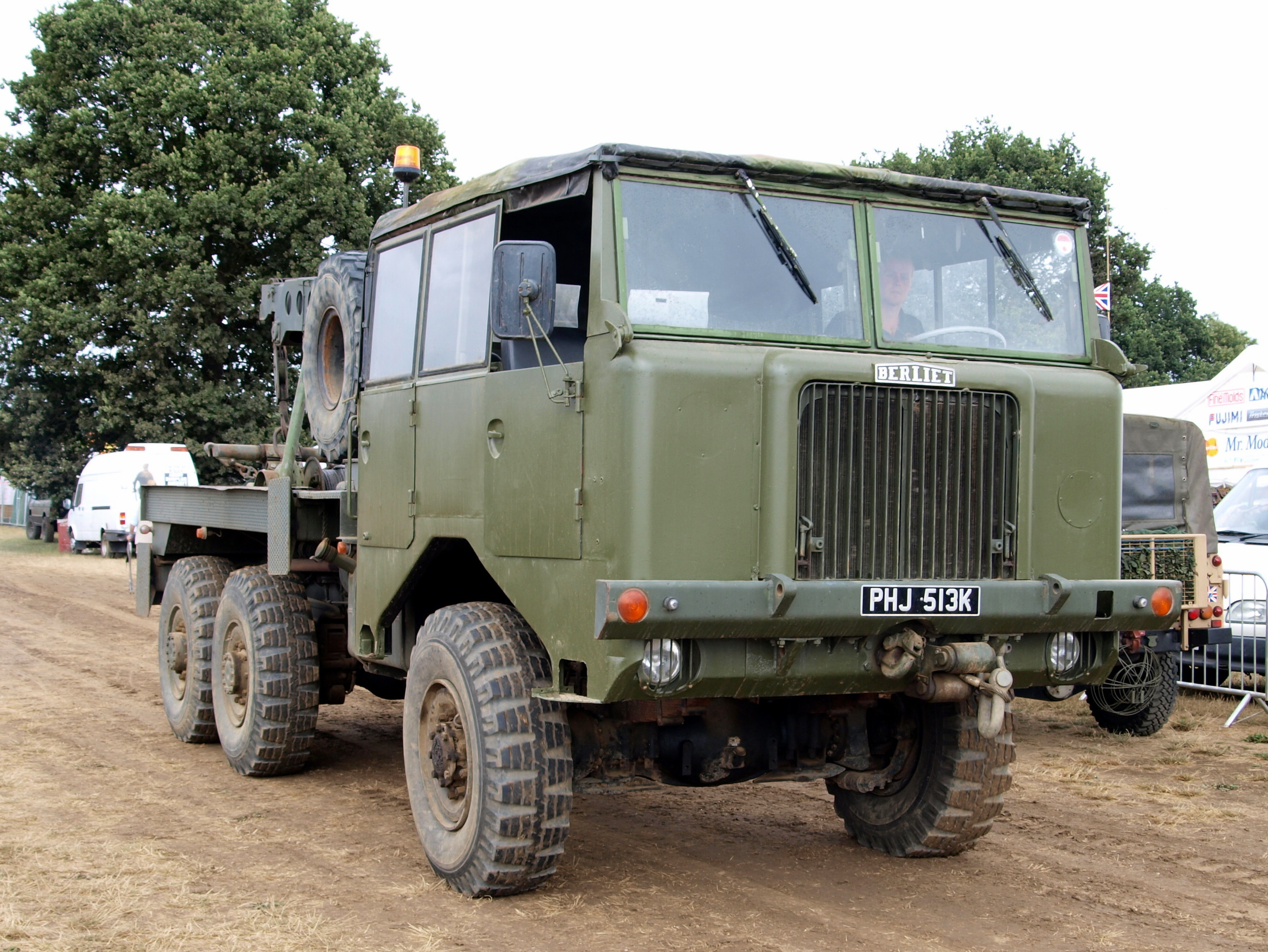 Berliet recovery truck TBU 15 CLD (Camion Lourd de Dépannage)